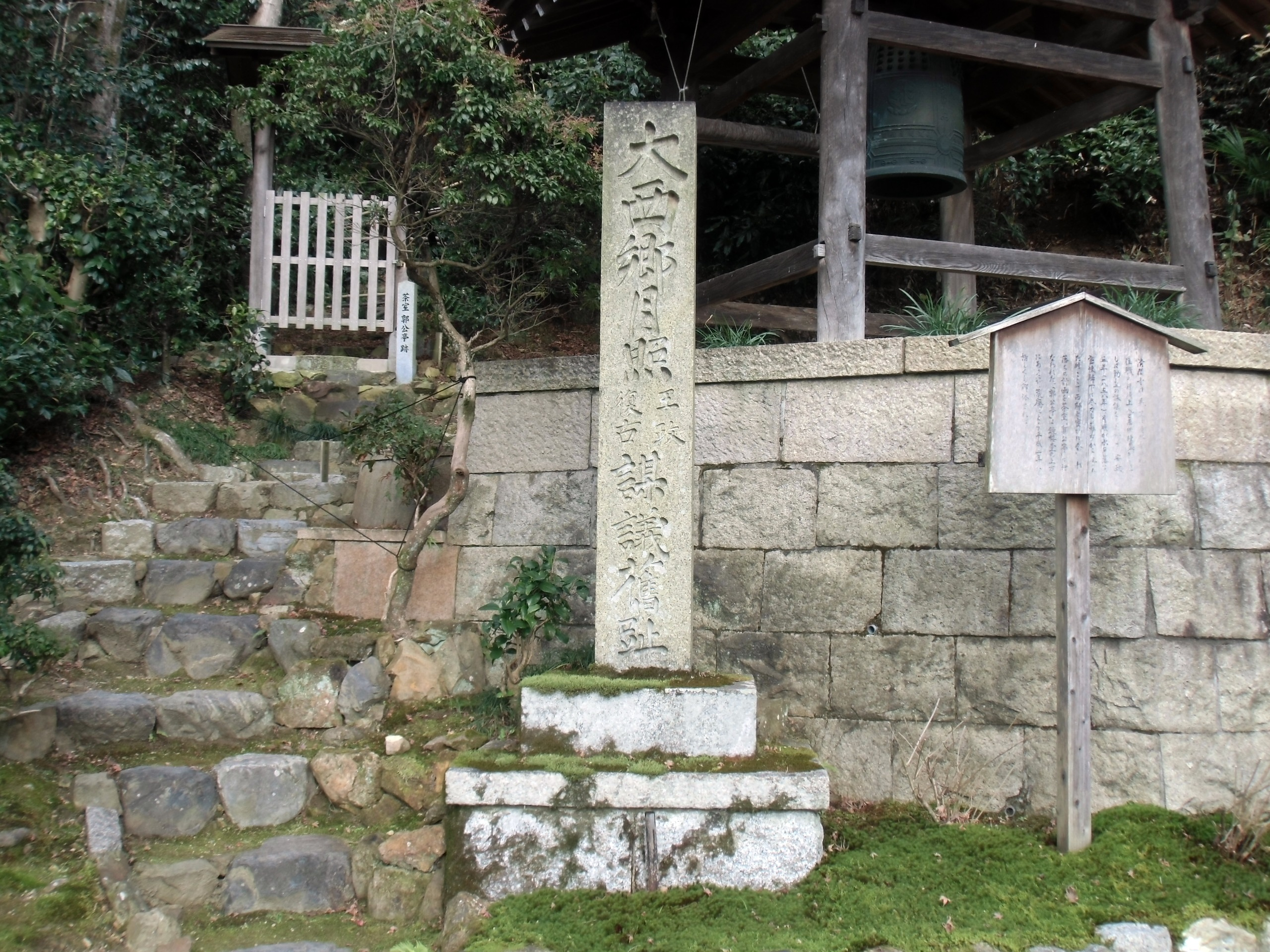 清閑寺境内にある「大西郷月照王政復古謀議舊趾」と彫られた石碑